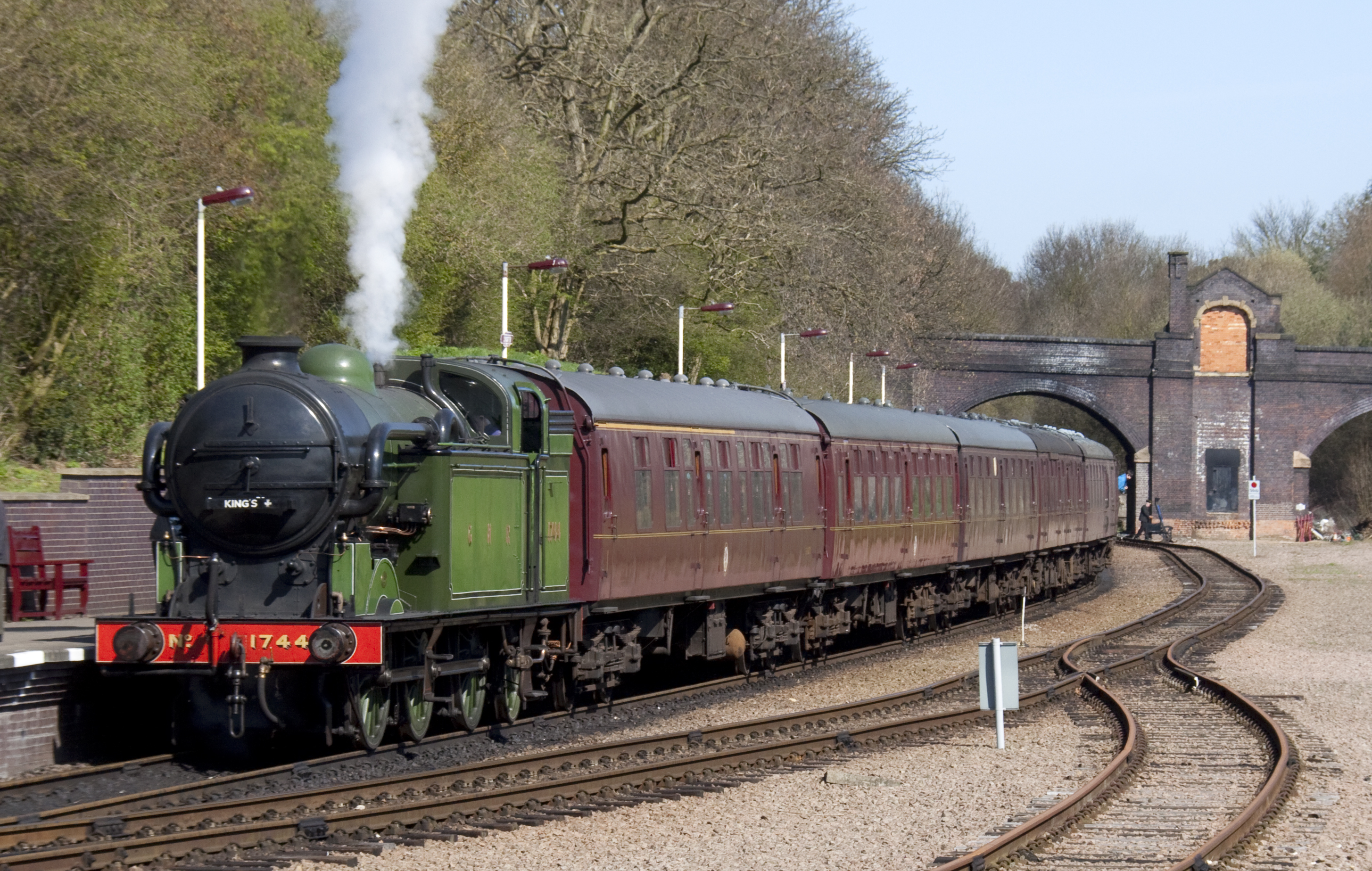 GNR 1744 3